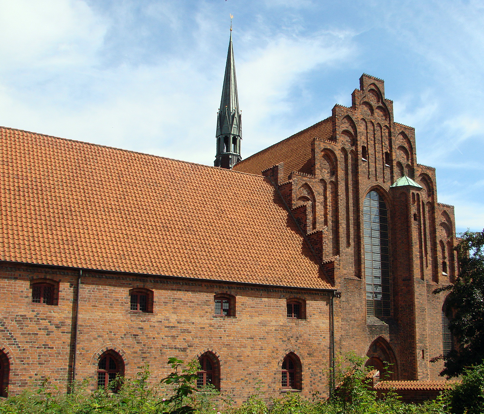 Sankt Mariæ Kirke som udgør den sydlige fløj af Vor Frue Kloster i Helsingør blev stiftet af Erik af Pommern, og bygget af Karmeliterordenen omkring 1430, kort efter Øresundstoldens indførelse.